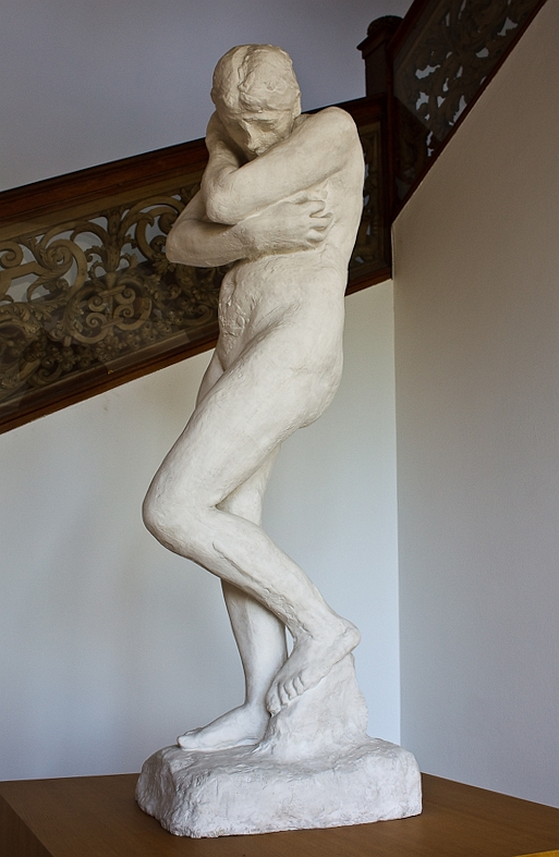 Eva na de zondeval, Rodin (Collectie 15de-17de eeuw, zaal 53) Auguste Rodin Parijs 1840-Meudon 1917 Eva na de Zondeval, 1881 Gips Schenking: J. Hudig 1899 BEK1330 (MK) Vlak na de zondeval buigt Eva schaamtevol het hoofd en slaat de armen om haar borsten. Deze levensgrote, in gips gegoten 'Eva', werd in 1899 na Rodin-tentoonstelling in Rotterdam aan het museum geschonken. Het was de eerste Rodin in een Nederlandse collectie. Naar aanleiding van de schenking bezocht Rodin zelf Museum Boijmans. Auguste Rodin 1840 Paris-Meudon 1917 Eve after the Fall, 1881 Plaster Donation: J. Hudig 1899 BEK1330 (MK) Shortly after the Fall, Eva bends her head with shame and covers her breasts. This life-size, cast in plaster 'Eve' was given to the museum in 1899 after the Rodin exhibition. It was the first Rodin in a Dutch collection. Following the gift itself, Rodin paid Museum Boijmans a visit.